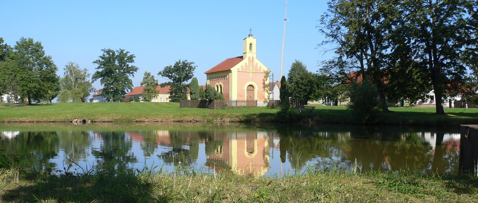 Munice